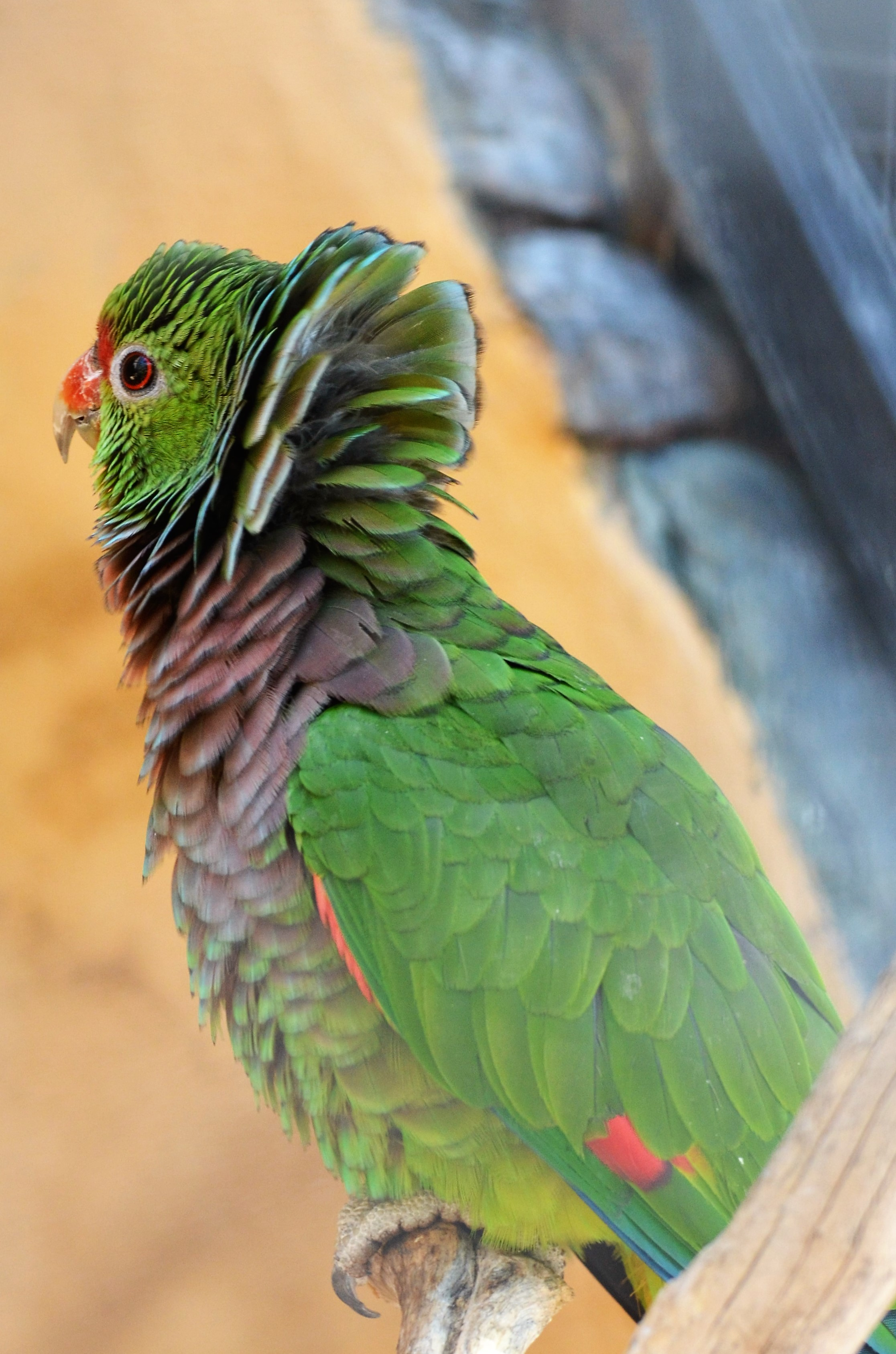 Taubenhalsamazone (Amazona vinacea) Aufnahme im Palmitospark auf Gran Canaria